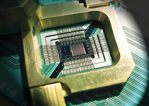 Computador cuántico